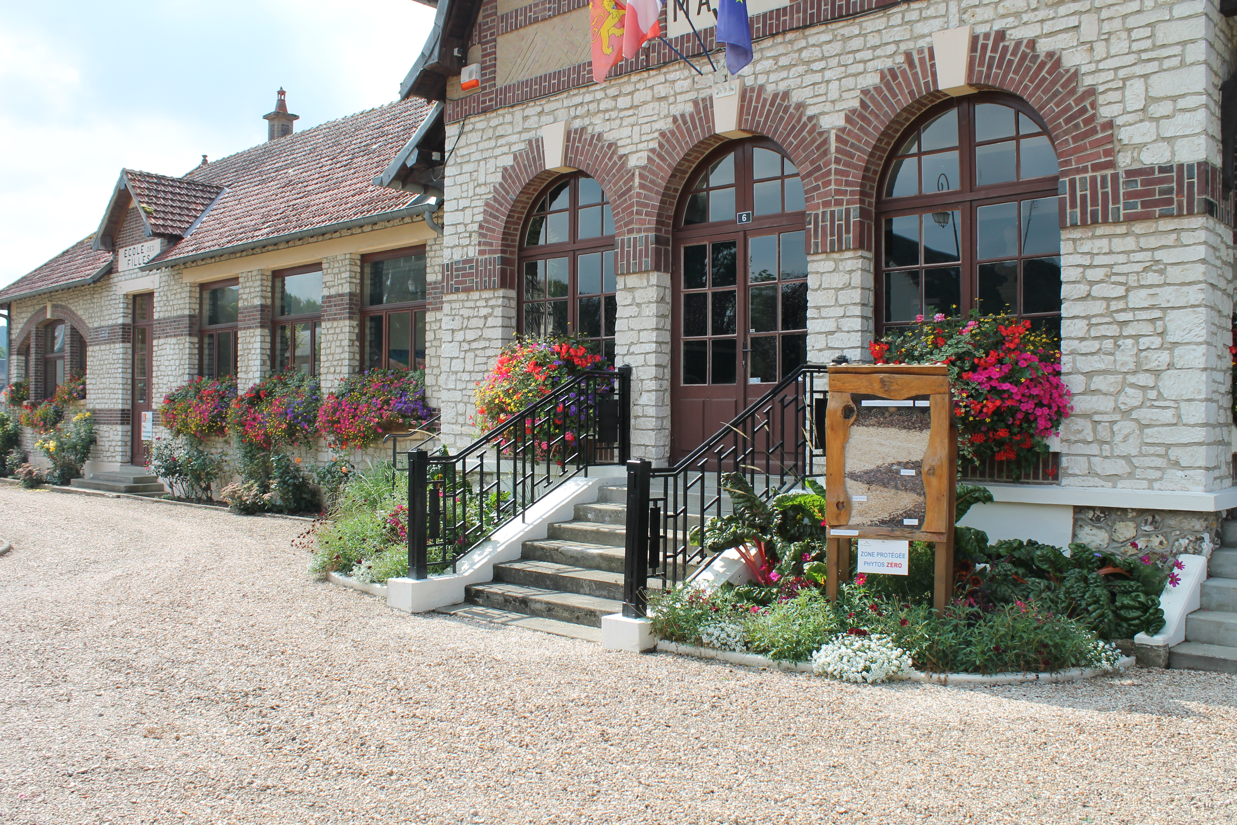 L'ancienne école des filles et des garçons entourent la mairie